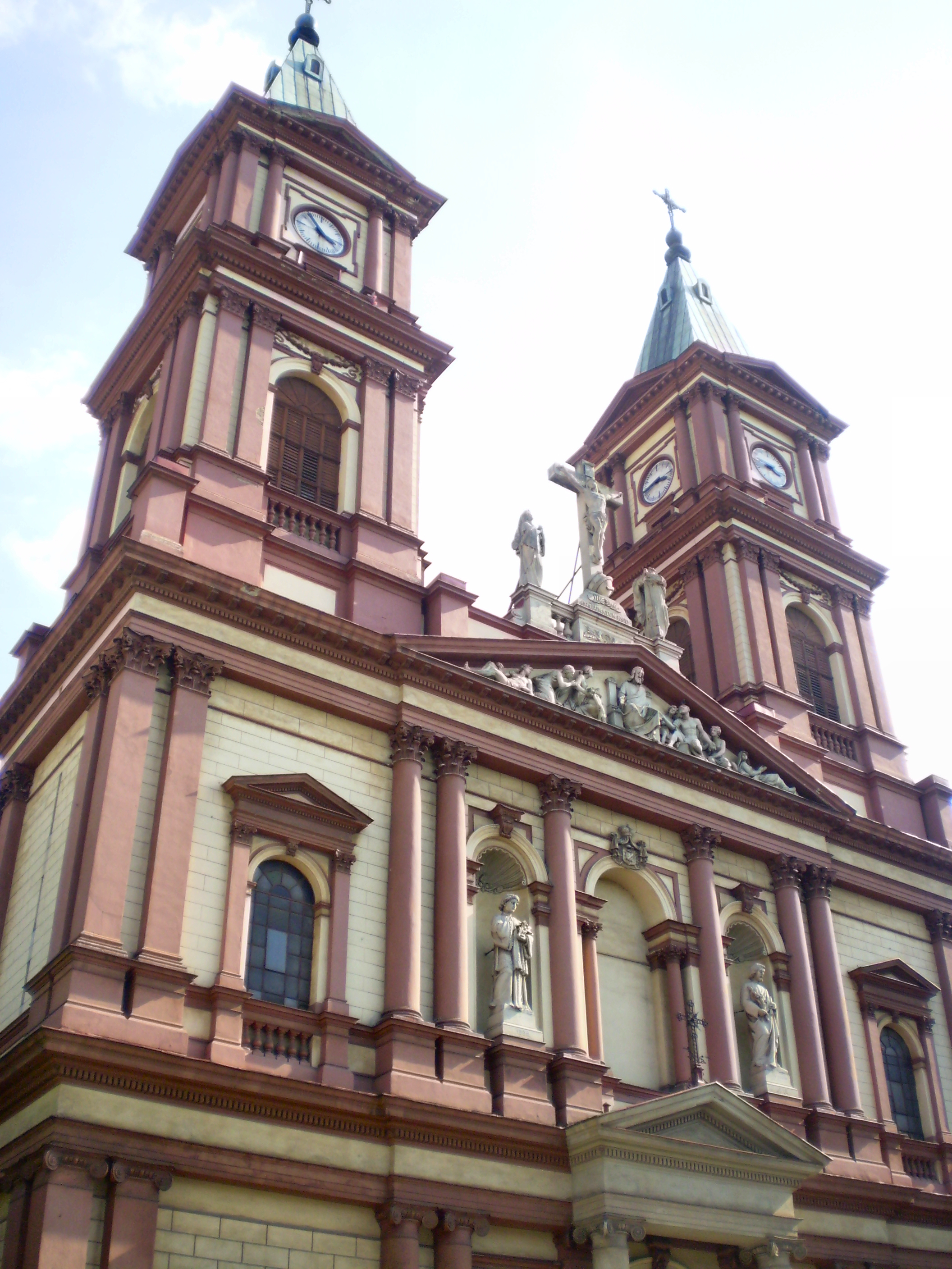 Věže katedrály Božského spasitele v Ostravě.